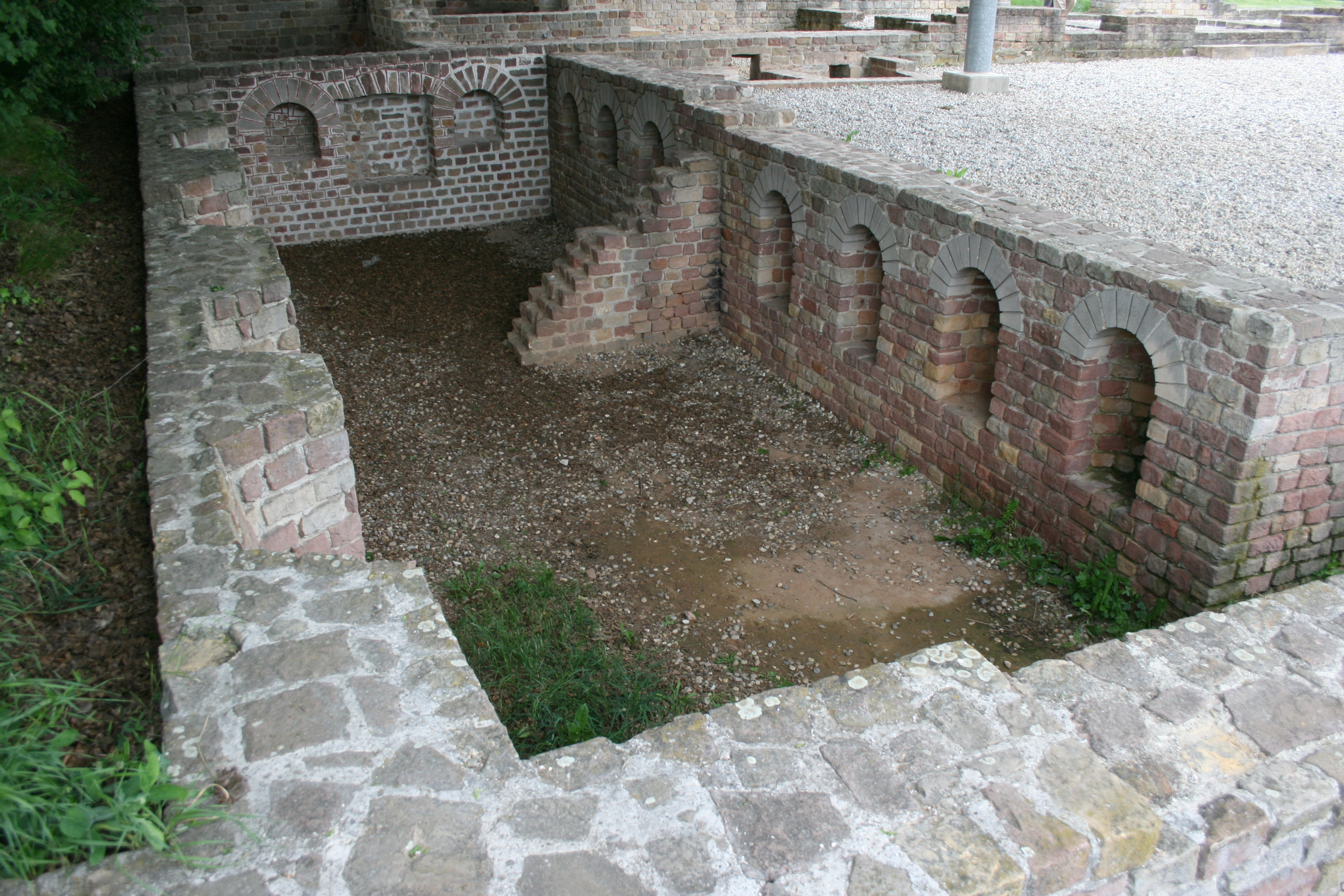 Römische Villa Wachenheim, Ansicht des rekonstruierten Kellers von Süden.